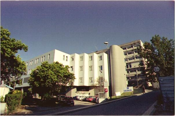 Lado Sul do Hospital de São Marcos em braga